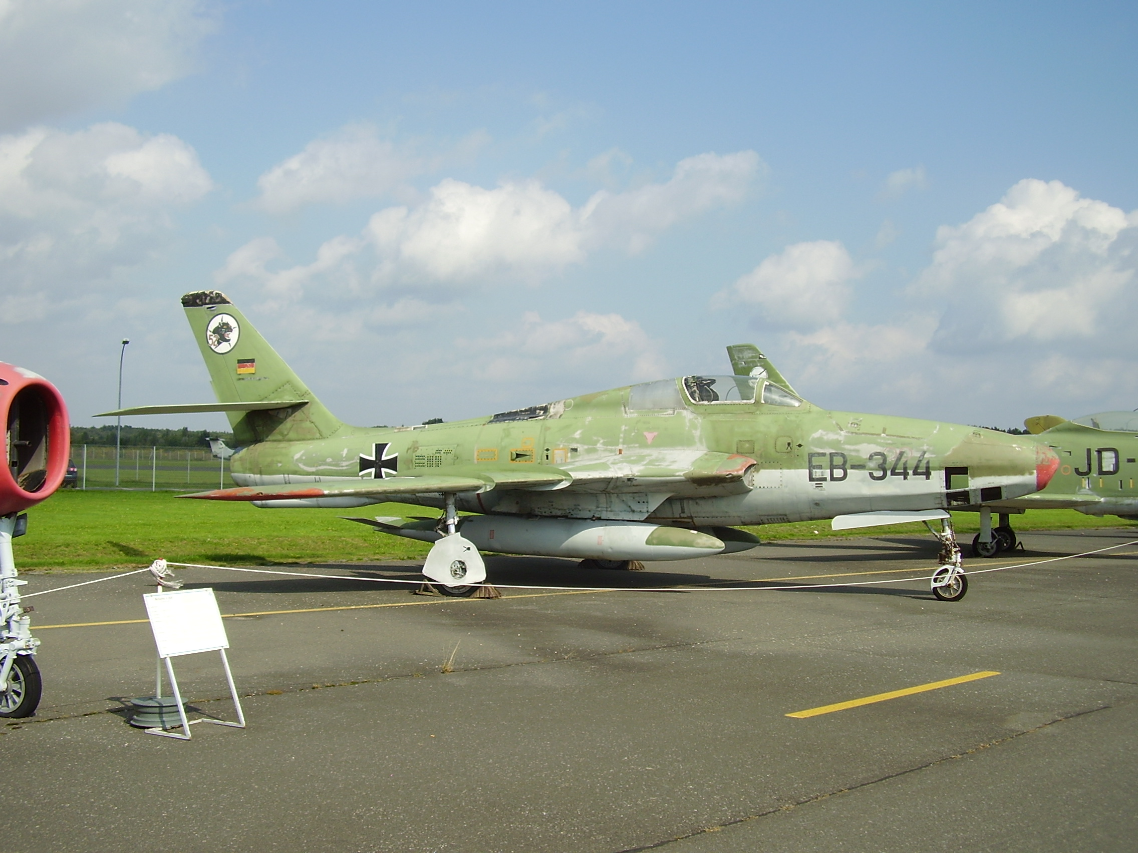 Luftwaffenmuseum der Bundeswehr; Airforce Museum of the Bundeswehr; Berlin-Gatow, RF-84F